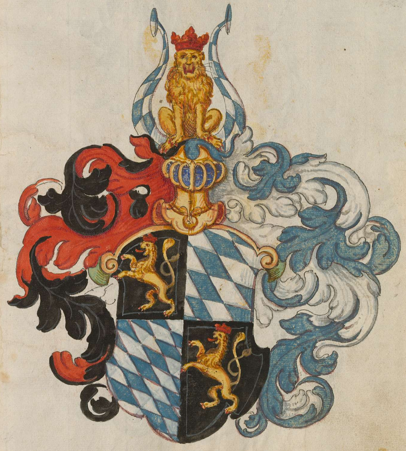 Wappen der Pfalzgrafen bei Rhein, Herzog in Bayern - Großes Wappenbuch, enthaltend die Wappen der deutschen Kaiser, der europäischen Königs- und Fürstenhäuser, der Päpste und Kardinäle, Bischöfe und Äbte bis zu den lebenden Repräsentanten zur Zeit der Regentschaft Kaiser Rudolfs II. und Papst Gregors XIII. - Cod.icon. 333